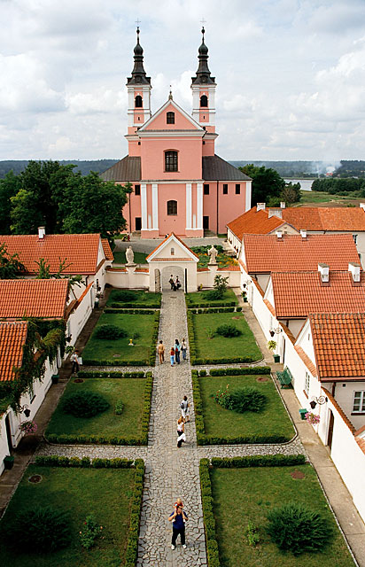 Klasztor kamedułów w Wigrach w północno-wschodniej Polsce na terenie Pojezierza Suwalskiego. W chwili obecnej, klasztor nie pełni już swojej pierwotnej funkcji i jest wykorzystywany jako ośrodek wypoczynkowy. Nadal jednak stanowi godny odwiedzenia obiekt turystyczny.